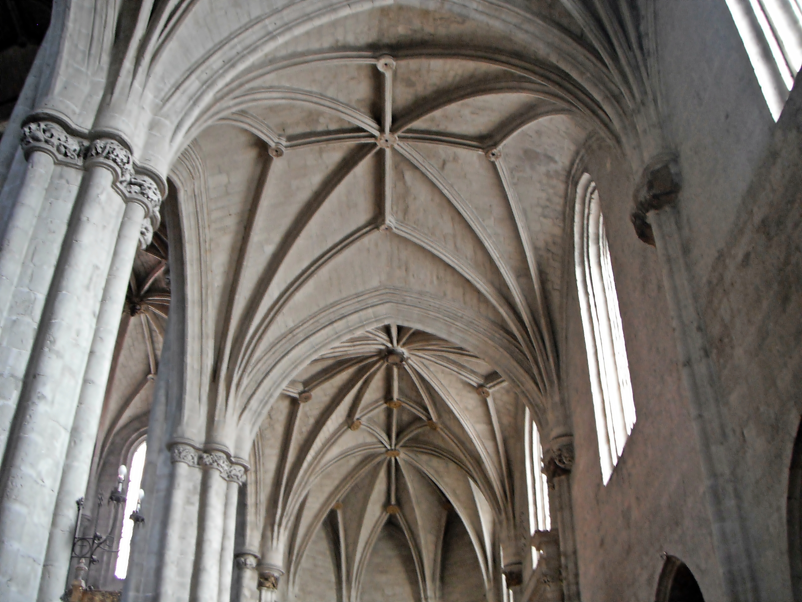 Iglesia del monasterio de San Benito el Real (Valladolid)